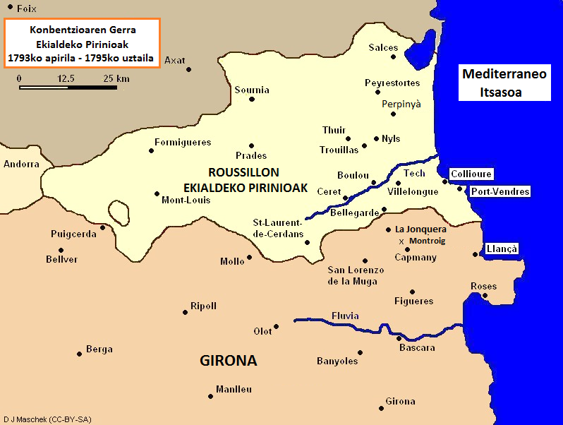 Konbentzioaren Gerra Katalunian, Pirinioen ekialdean